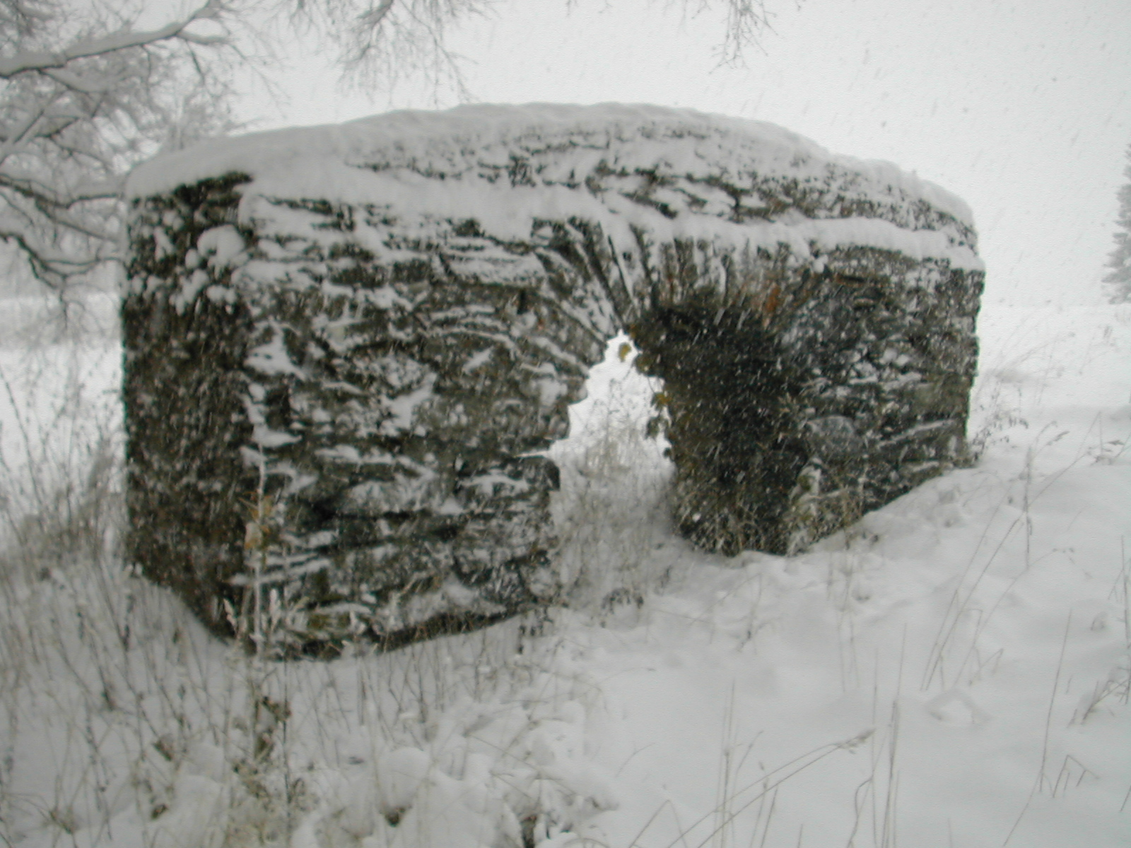 Last remnants of Ringvål gård.